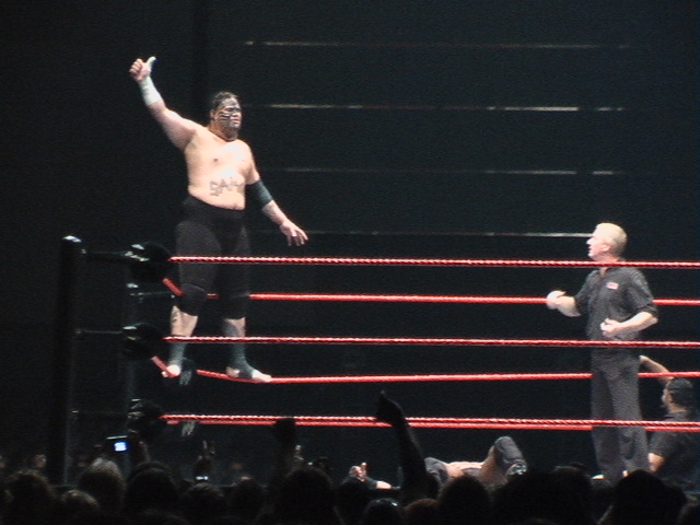 Umaga kurz vor seinem Samoan Drop